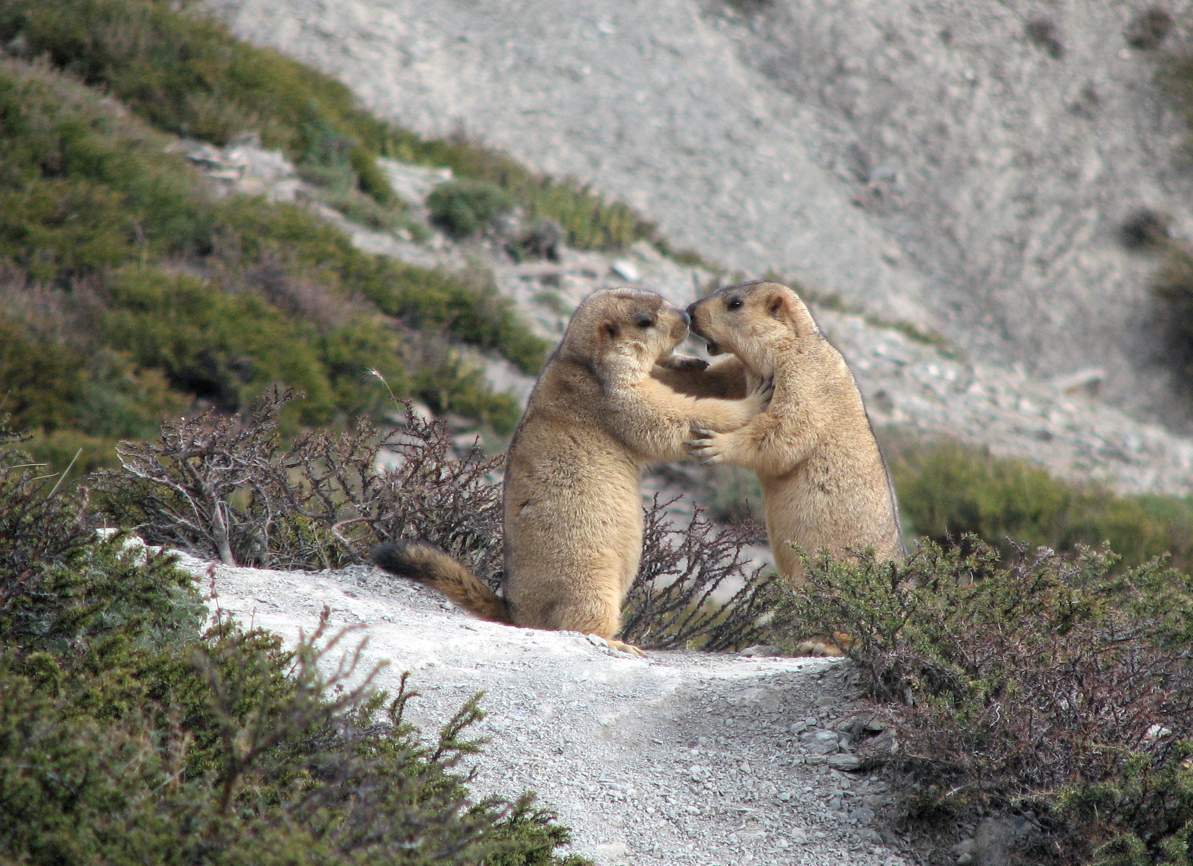 Himalayan Marmots, shot near Ganda La, Ladakh.